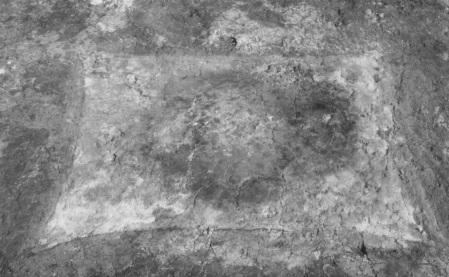 Llar en forma de pell de toro dels Vilars d'Arbeca.